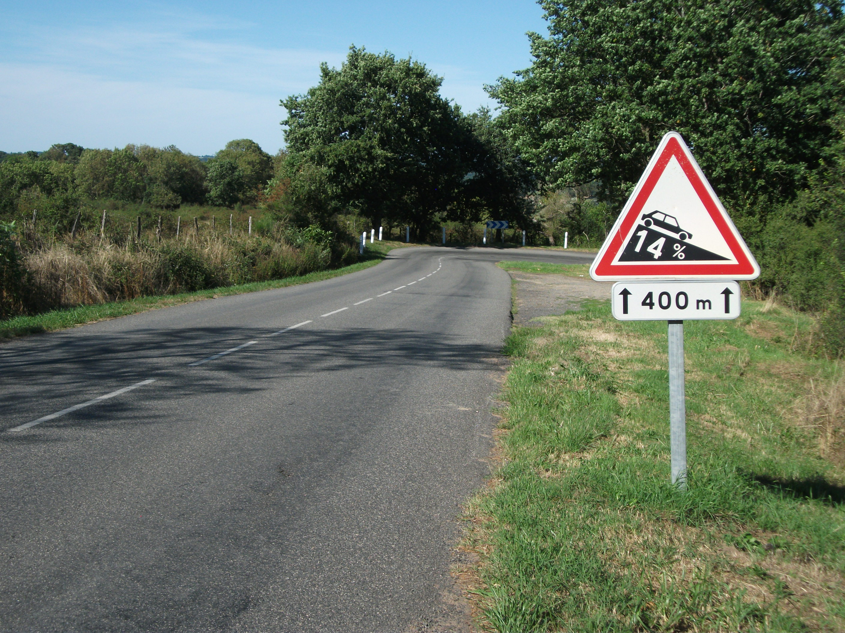 Pente à 14 % sur la D 906B, en direction de Bost. [8904]